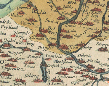 Fragment mapy Polski z atlasu Orteliusa